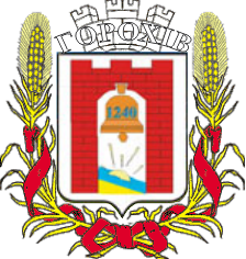 Herb miasta Horochów